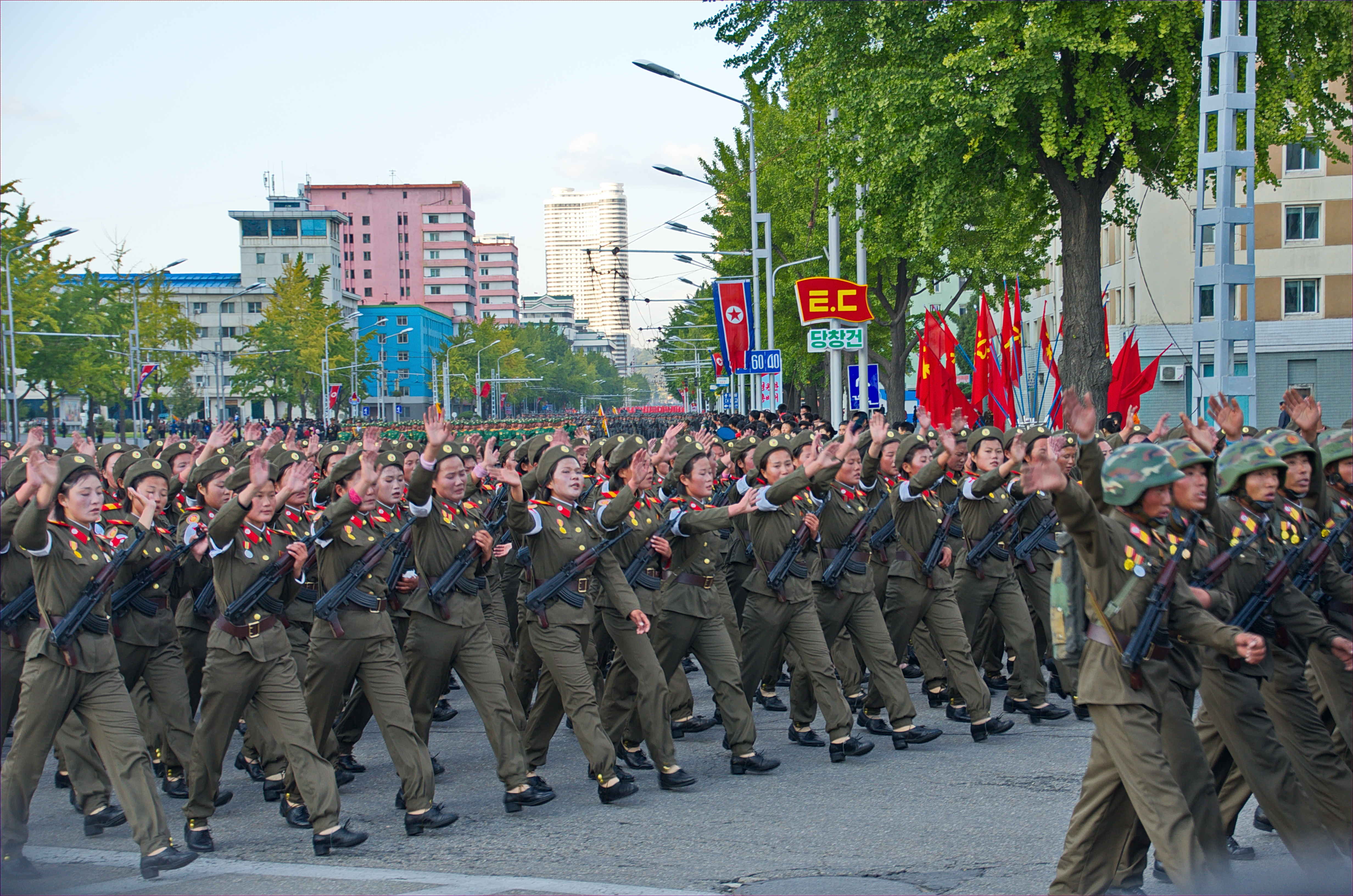 Nordkorea 2015 - Pjöngjang - Parade zum 75. JT der Arbeiterpartei